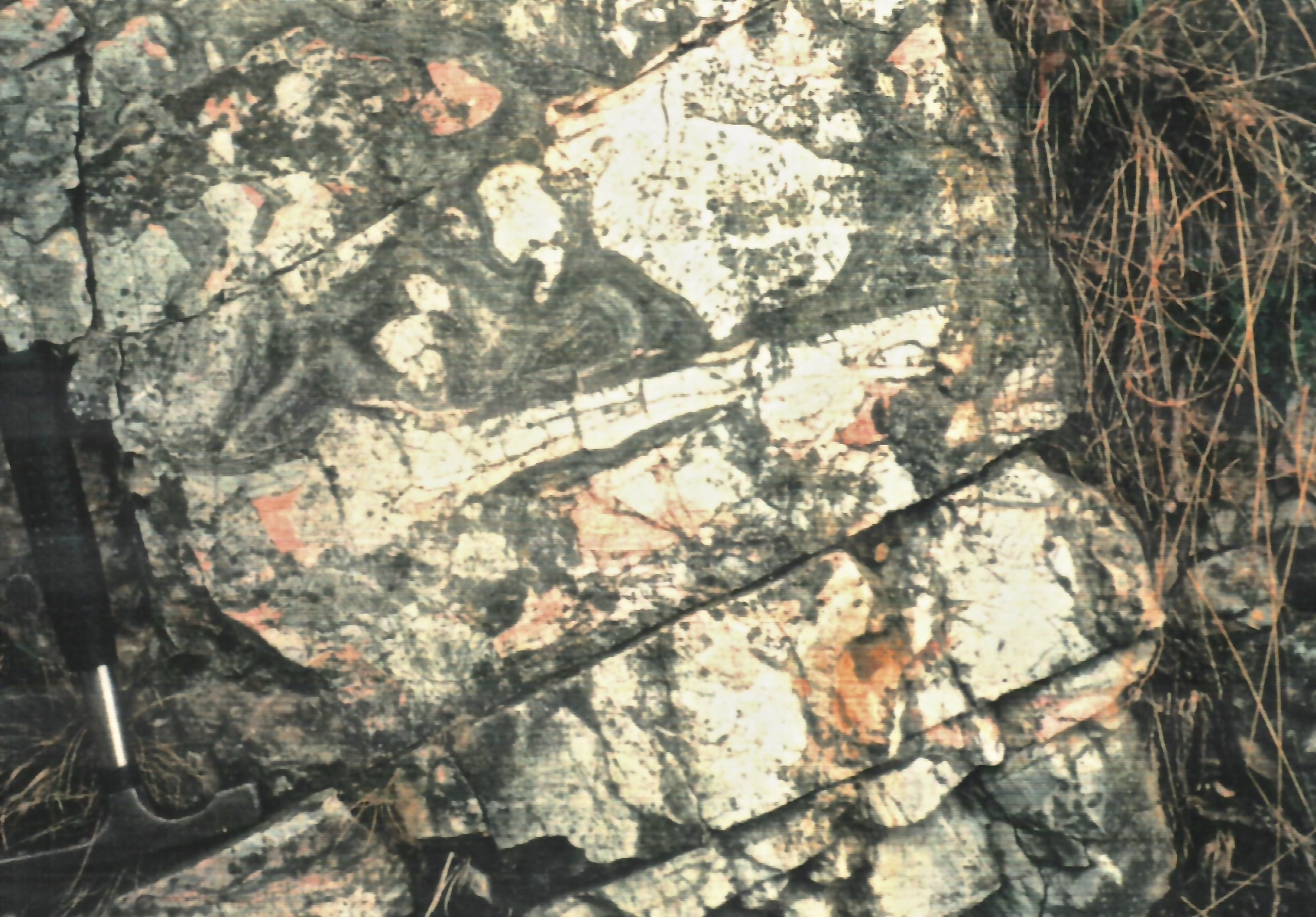 Mit Faserzementen und Mikriten zementierter Riffschutt, Schwefeltal (Elbingerode)